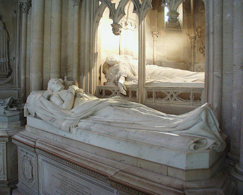 Gisants de Ferdinand-Philippe d'Orléans (1814-1842) et de son épouse Hélène de Mecklembourg-Schwerin (1814-1858).